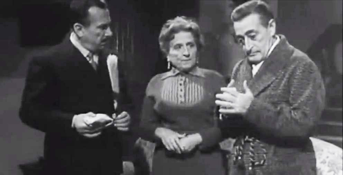 Screenshot del film Totò, Peppino e i fuorilegge (1956) Da sinistra: Peppino De Filippo, Titina De Filippo e Totò.